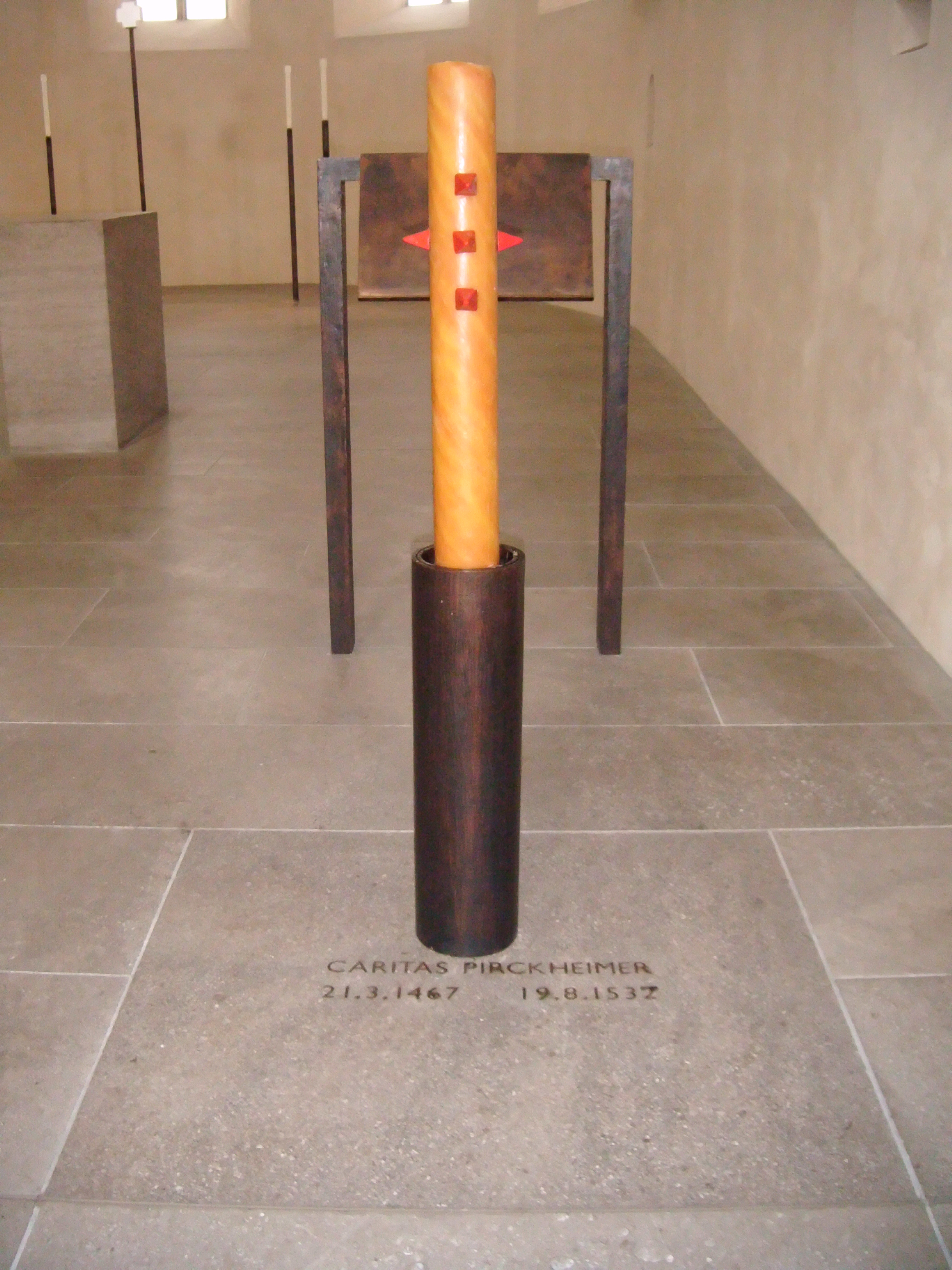 Grabstätte von Caritas Pirckheimer, Nürnberg, Chor der Klarakirche. Dorthin umgebettet vom Nonnenfriedhof hinter der Kirche, 1960.